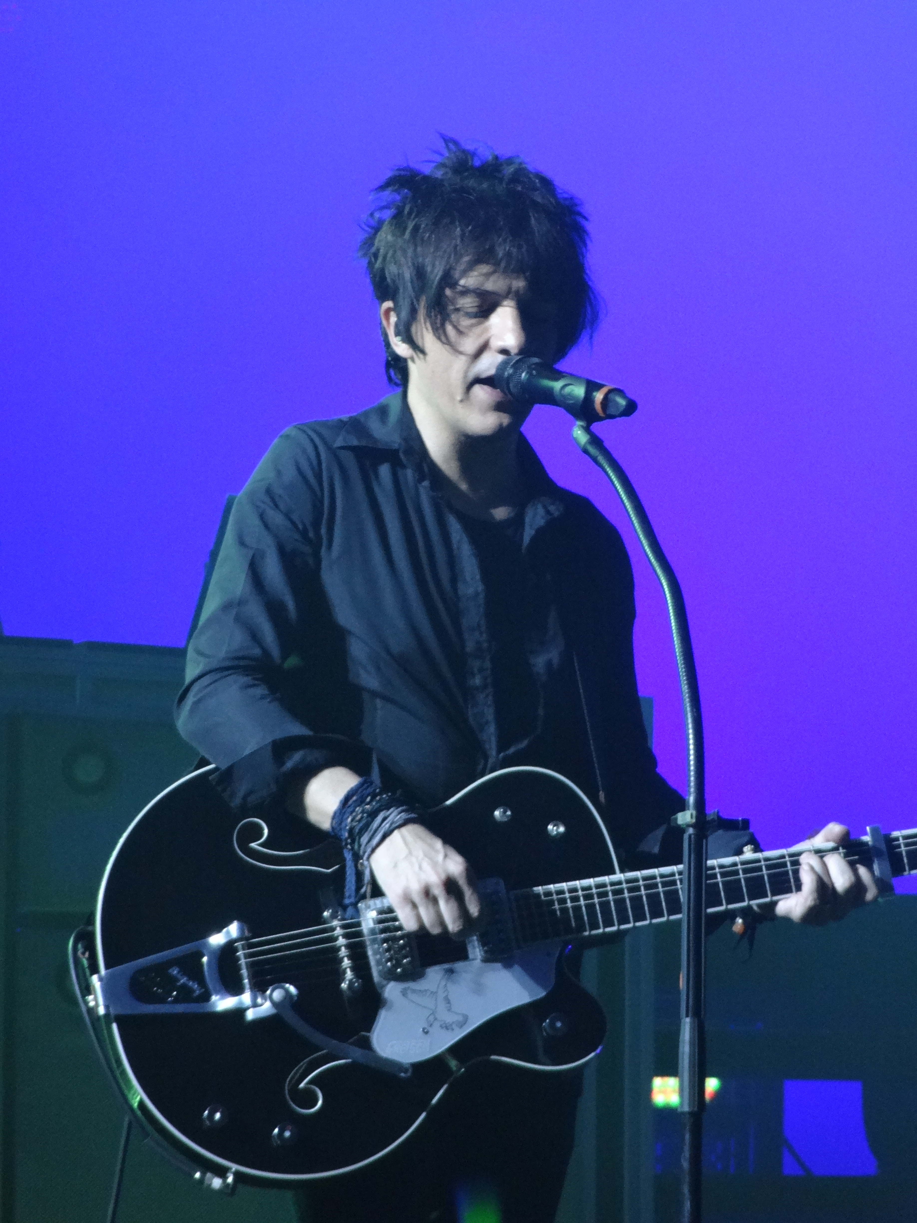 Nicola Sirkis lors du concert d'Indochine à Brest le 23 mars 2013